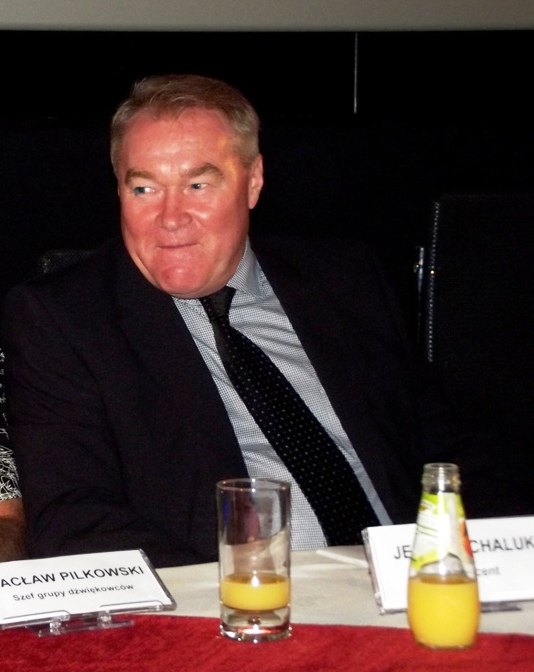 Jerzy Michaluk - zdjęcie zrobione podczas premiery produkcji "1920: Bitwa Warszawska" w Krakowie.